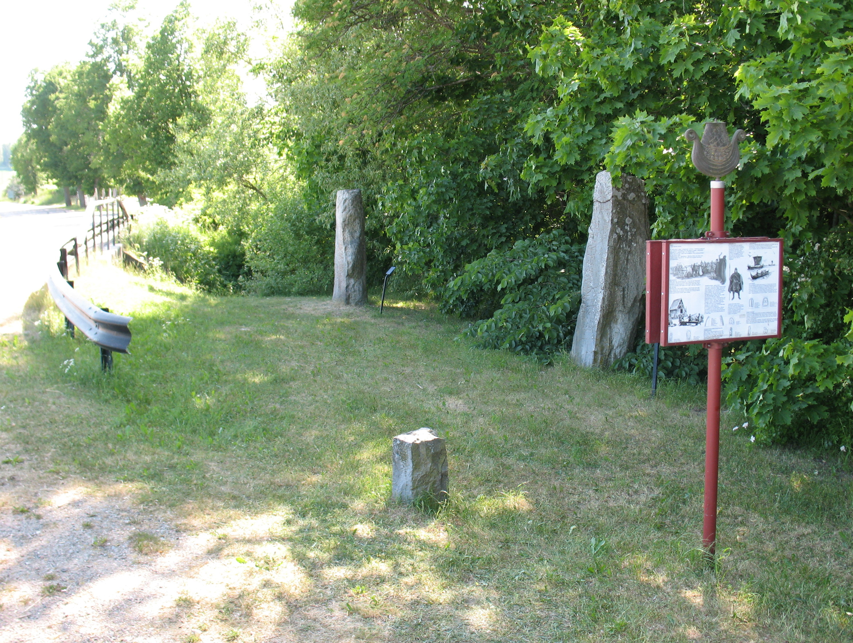 De båda runstenarna Sö 141 (närmast) och Sö Fv1948;289 (borterst) vid Aspa bro i Ludgo socken, Södermanland.